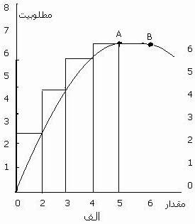 نموداری مقعر برای نشان دادن نسبت افزایش مصرف و افزایش مطلوبیت. همانگونه که از نمودار معلوم است،شیب مثبت نمودار به مرور کاهش می یابد(اما همچنان مثبت می ماند).اما در نهایت صفر می شود.